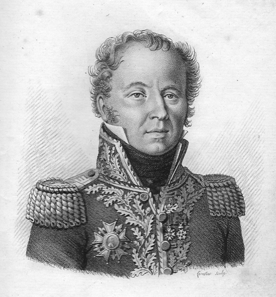 Le général Louis Emmanuel Rey (1768-1846). Il s'illustra lors de la défense de la ville de Saint-Sébastien en 1813.